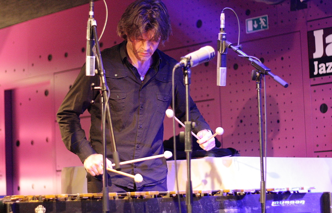 Jazz Dock Praha 2013